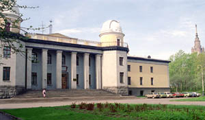 Государственный астрономический институт им.П.К.Штернберга